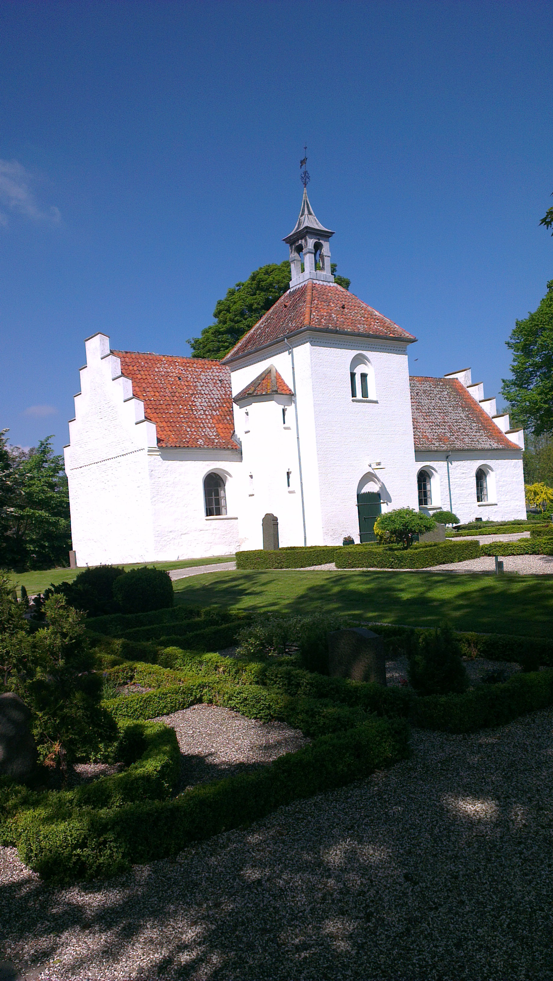 Kyndby Kirke i Kyndby Sogn i Horns Herred